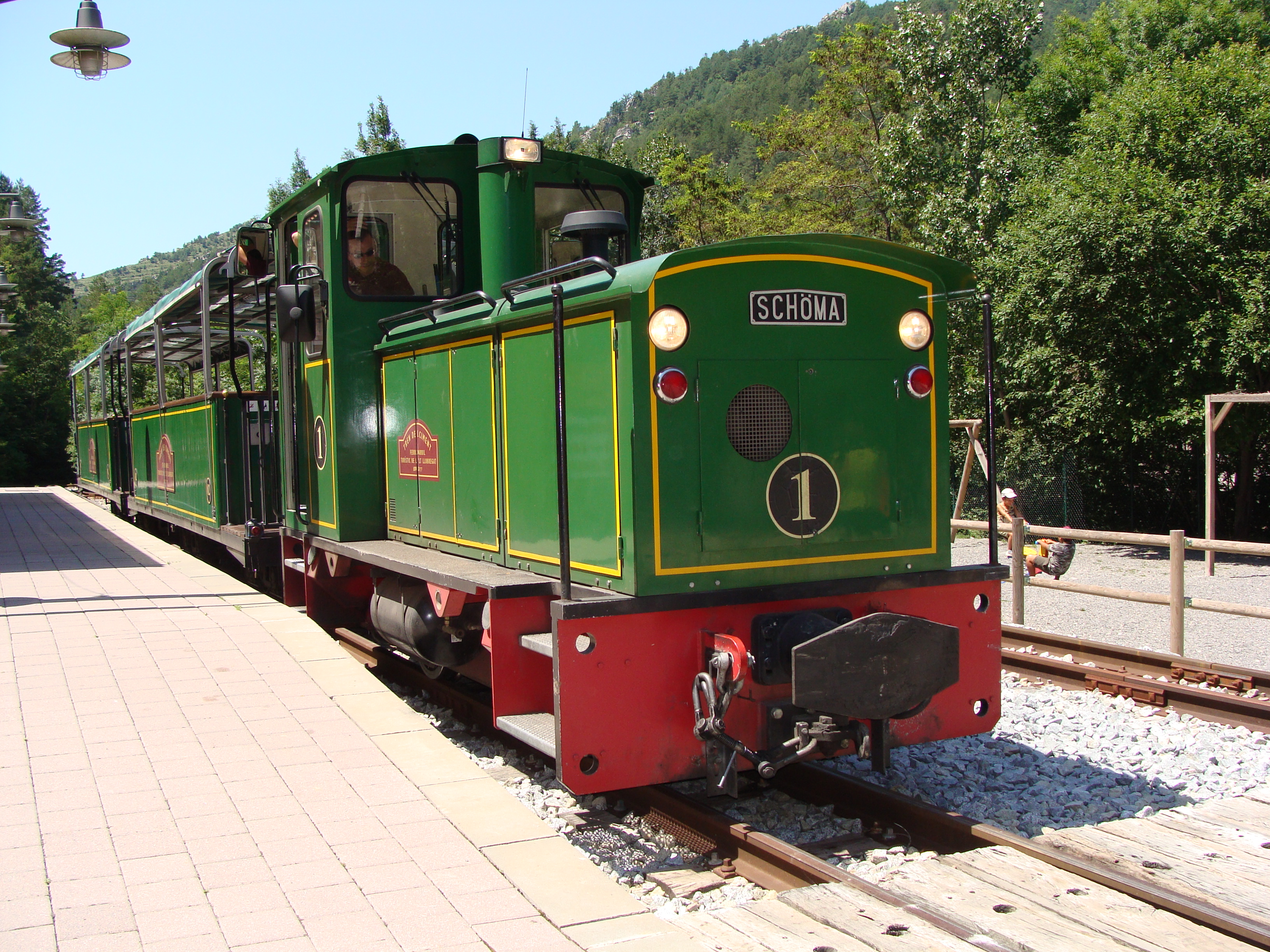 Locomotora dièsel SCHÖMA del "Tren del Ciment" fent entrada a l'estació de l'antiga fàbrica de ciment. Aquest tren uneix la població de la Pobla de Lillet amb el museu del Ciment Asland antiga fàbrica "Compañía General de Asfaltos y Portland Asland", dins del terme municipal de Castellar de n’Hug. Té una parada als jardins Artigas.